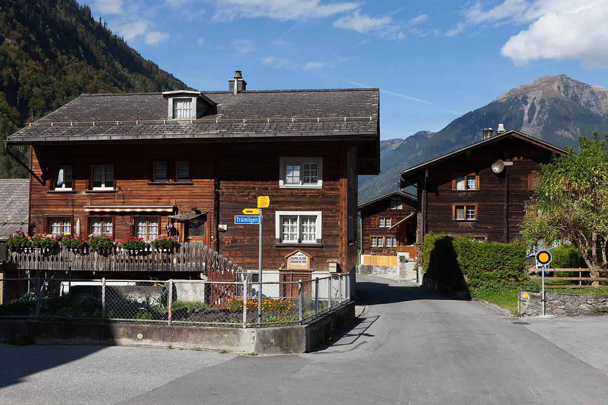 Dorfteil Trämligen in Matt im Sernftal (Gemeinde Glarus-Süd)